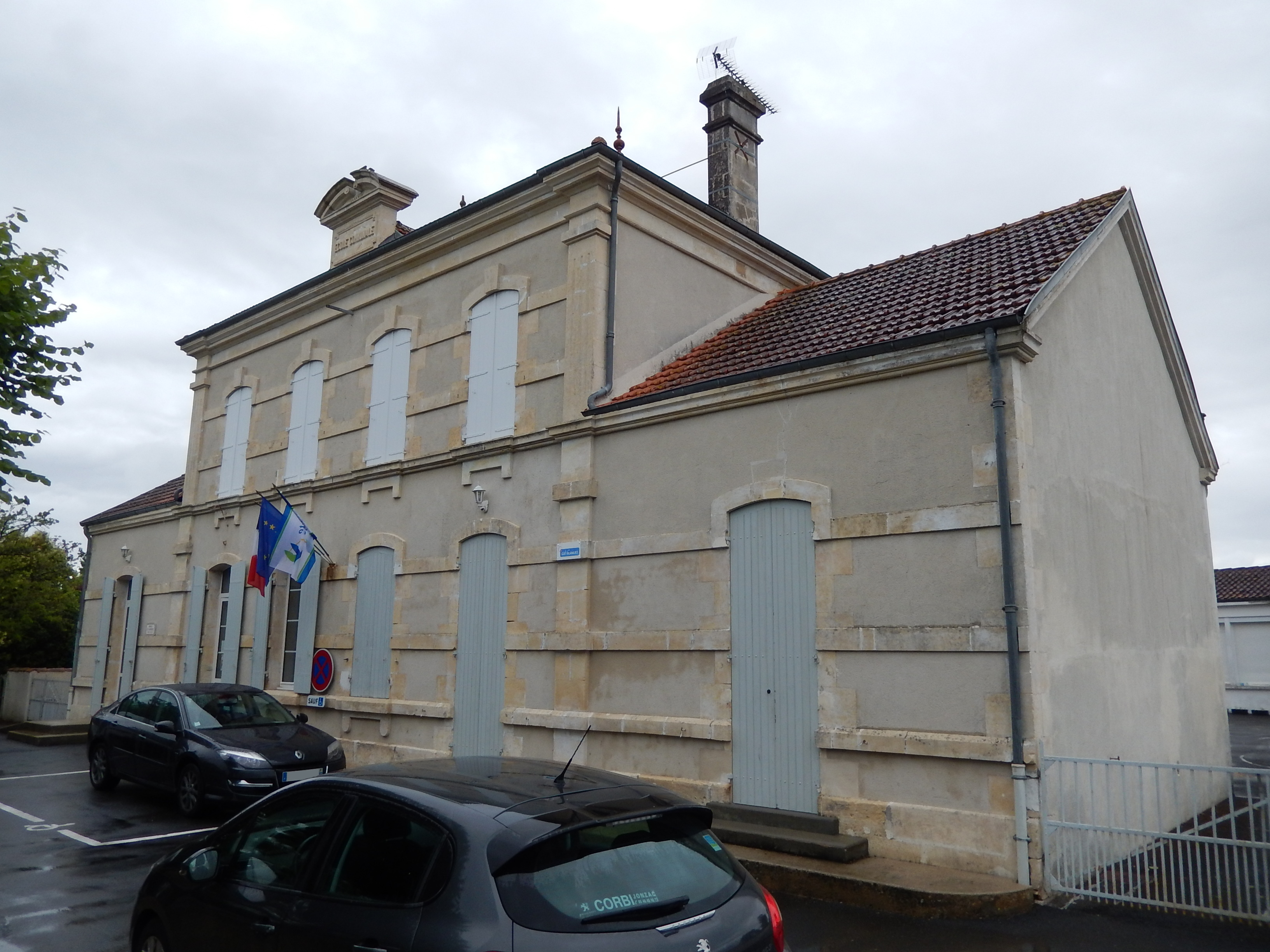 La mairie de la commune de Courcerac, en Charente-Maritime.